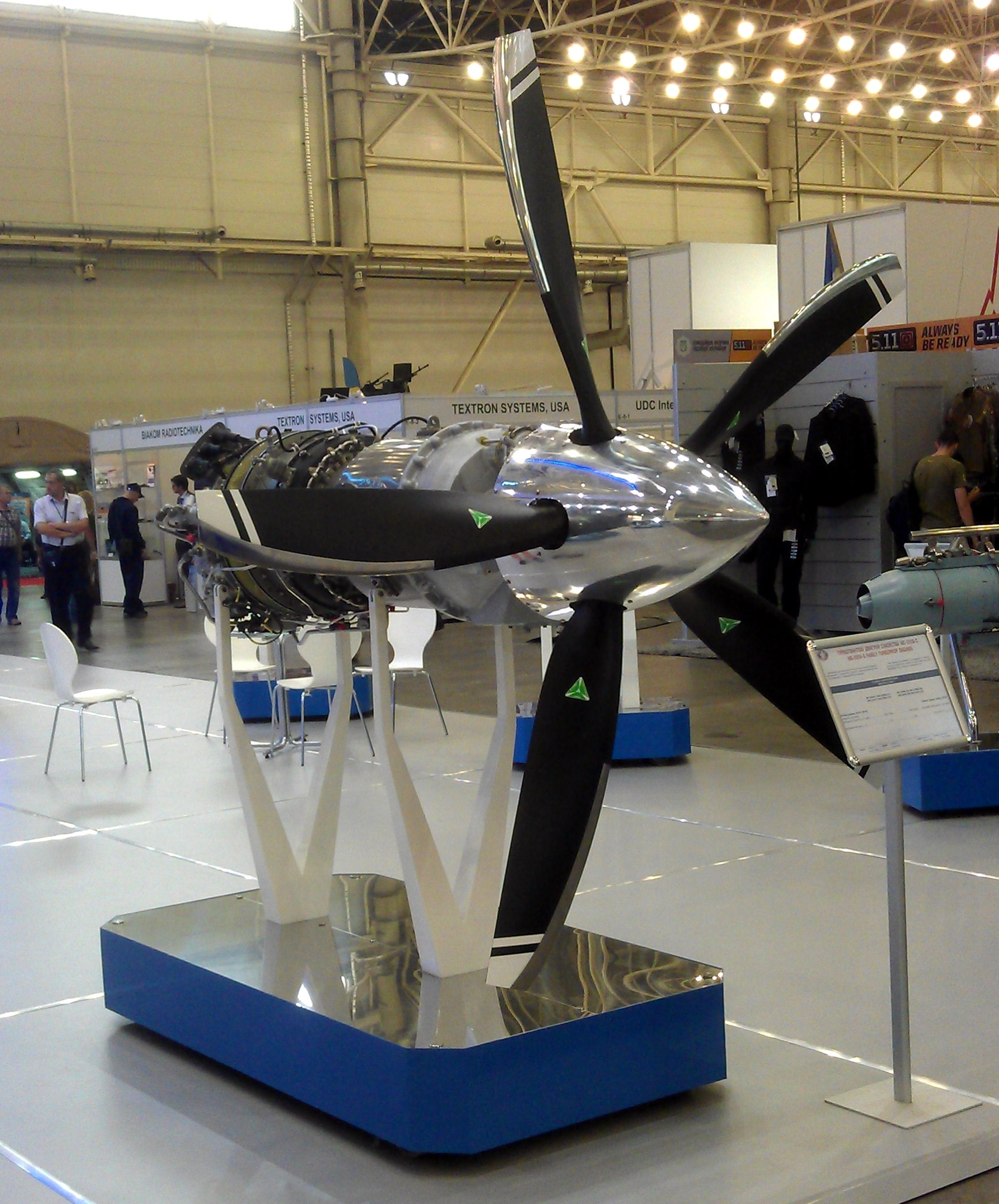 Авиационный турбовинтовой двигатель МС-500В-С. Выставка "Зброя та безпека", Киев, сентябрь 2015 г.